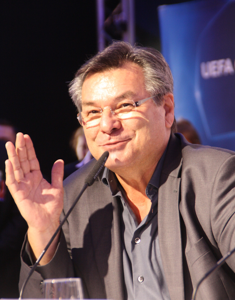 Waldemar 'Waldi' Hartmann, deutscher Journalist, Moderator und Sportreporter Hier am 15.09.2010 in München bei der Eröffnung der 'UEFA Champions League Trophy Tour""